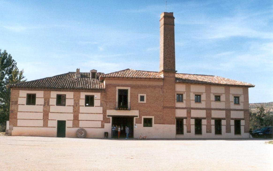 Antiguo molino hidráulico en Morata de Tajuña (Madrid) actualmente convertido en Museo Municipal. Está movido por un caz o cacera que toma sus aguas del propio río Tajuña. Autor Fev. Fecha junio 2002.